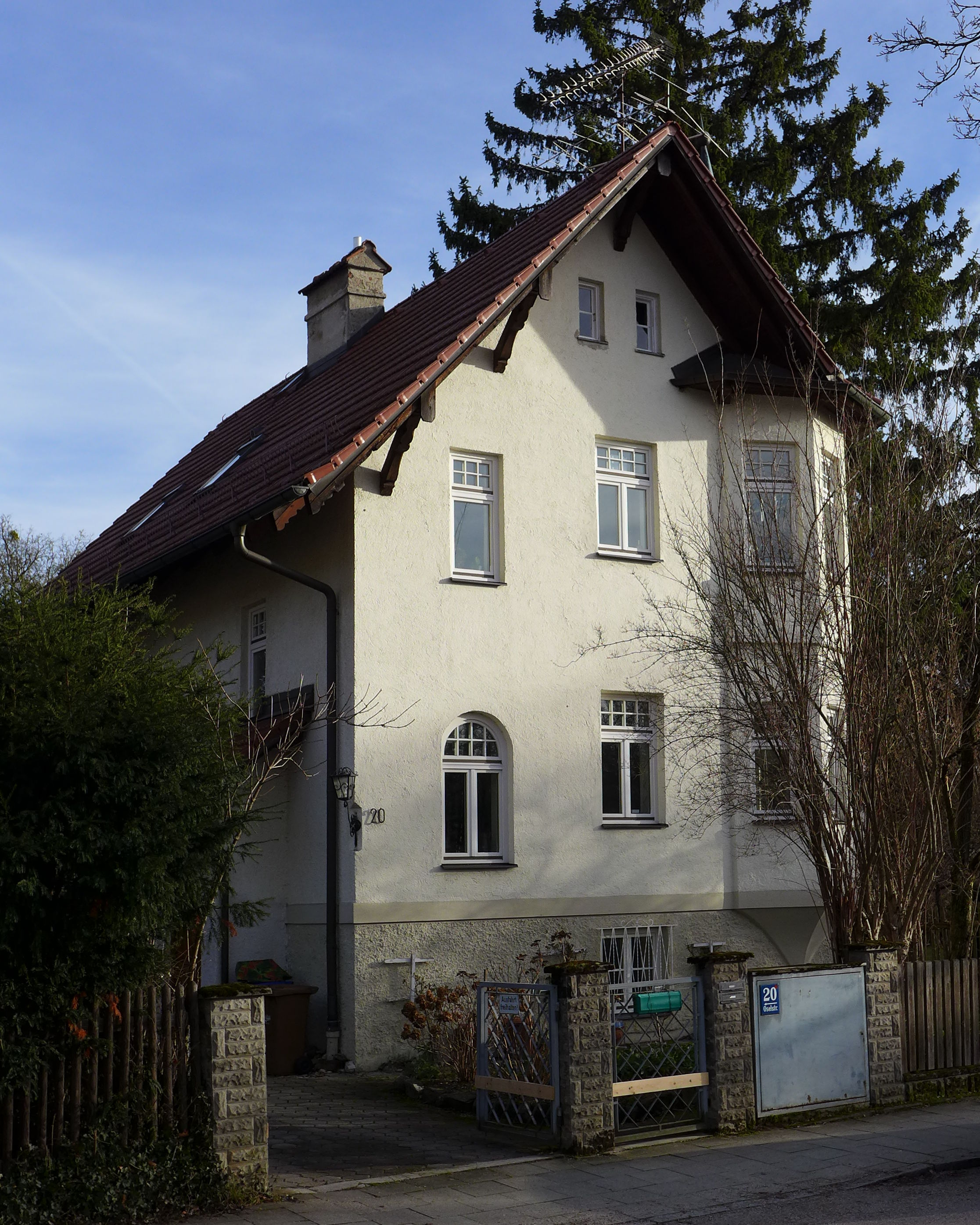 Oselstr. 20, München